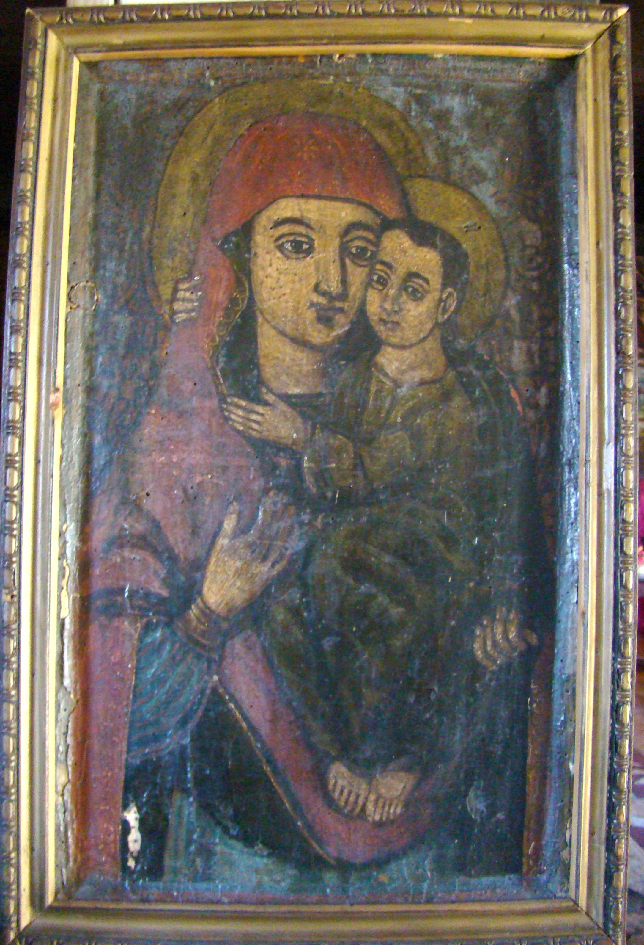 Biserica de lemn „Cuvioasa Paraschiva” din Rădulești